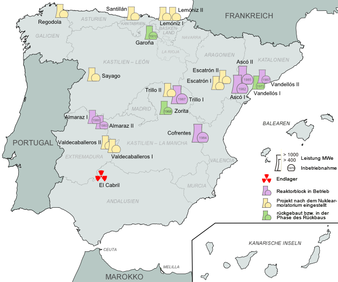 Kerntechnische Anlagen in Spanien, Stand 2008, deutsche Version